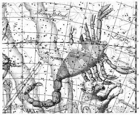 Scorpius